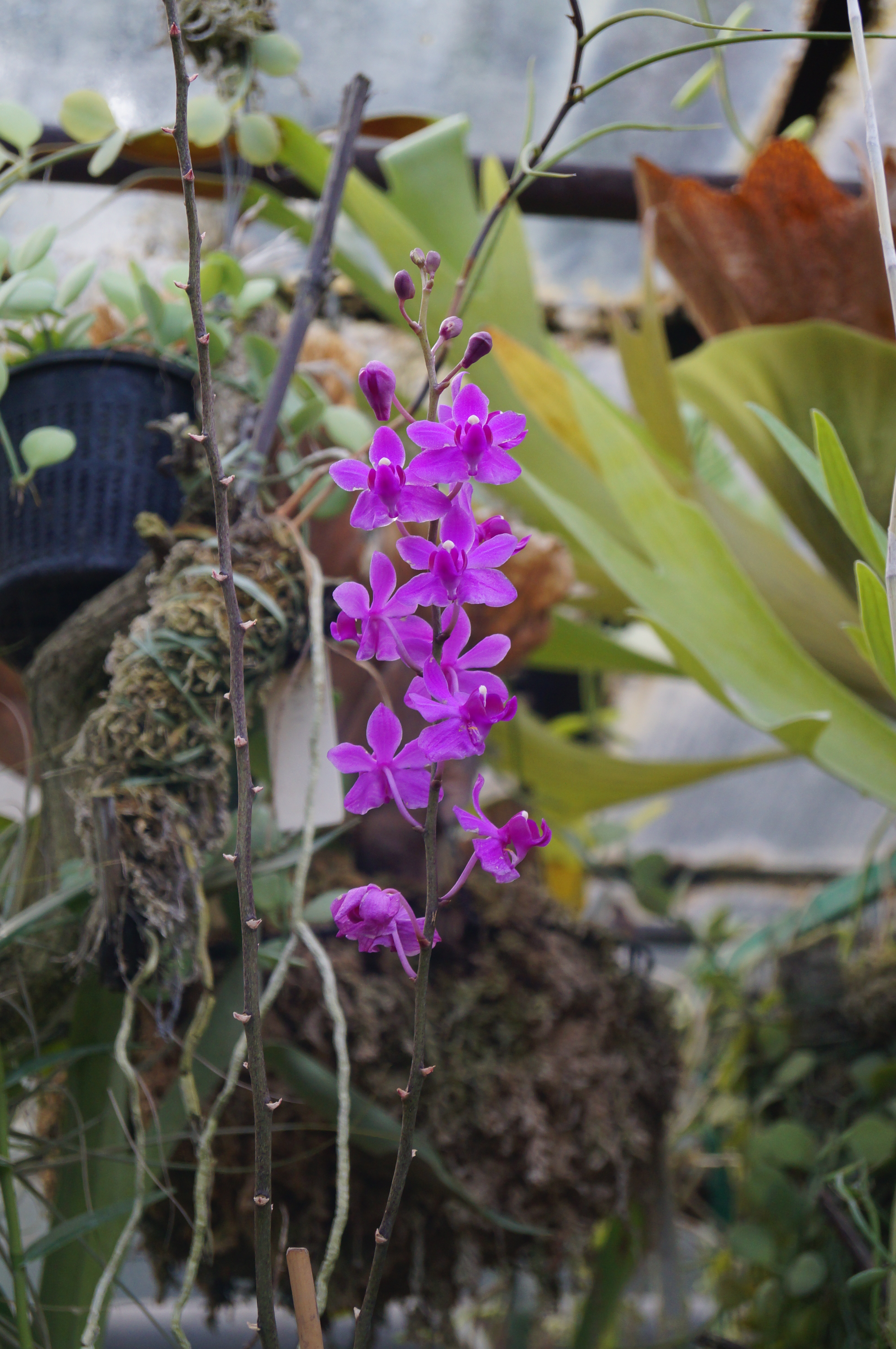 Ogród Botaniczny UJ w Krakowie